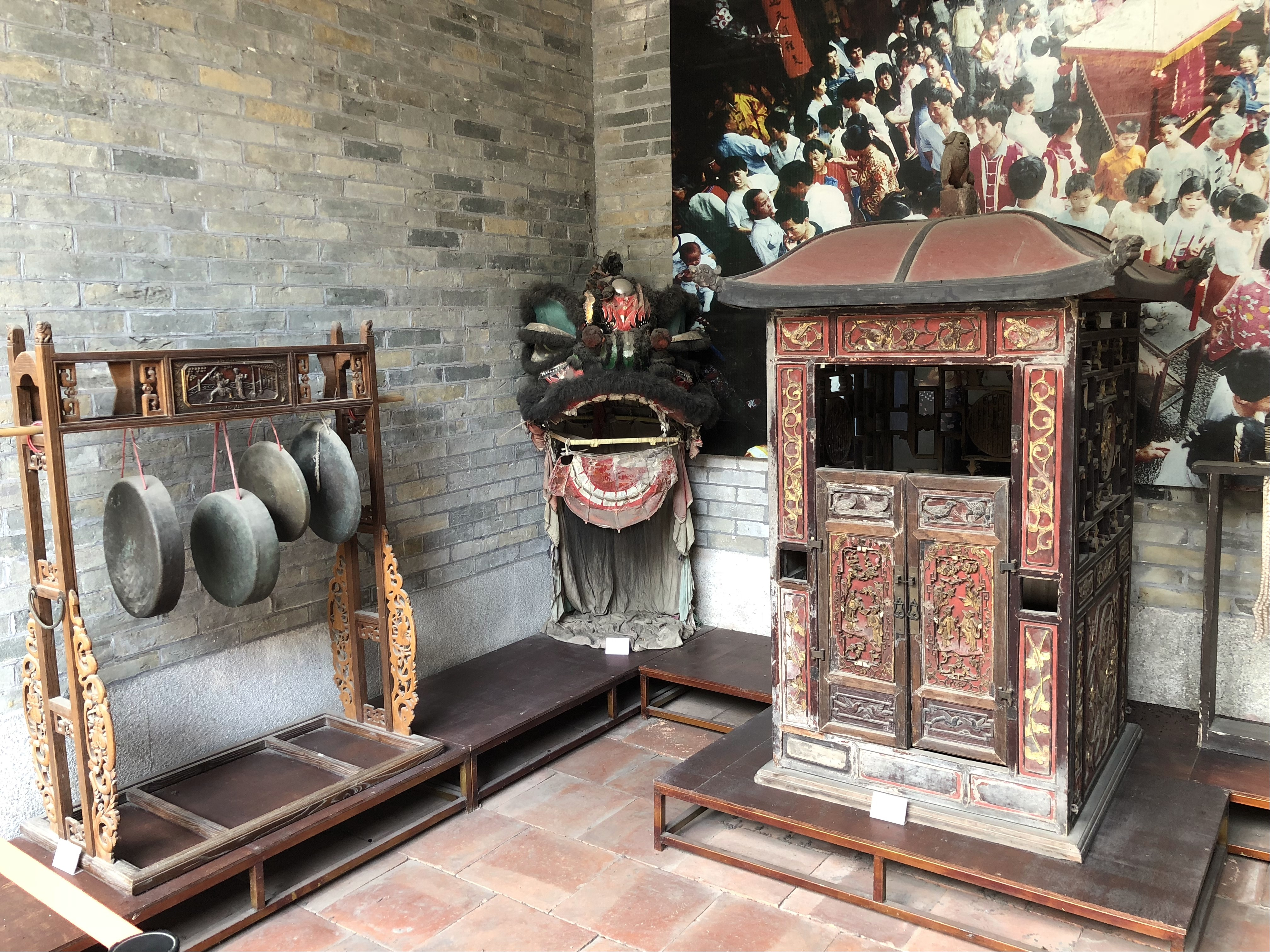 中文（中国大陆）: 婚俗展品。